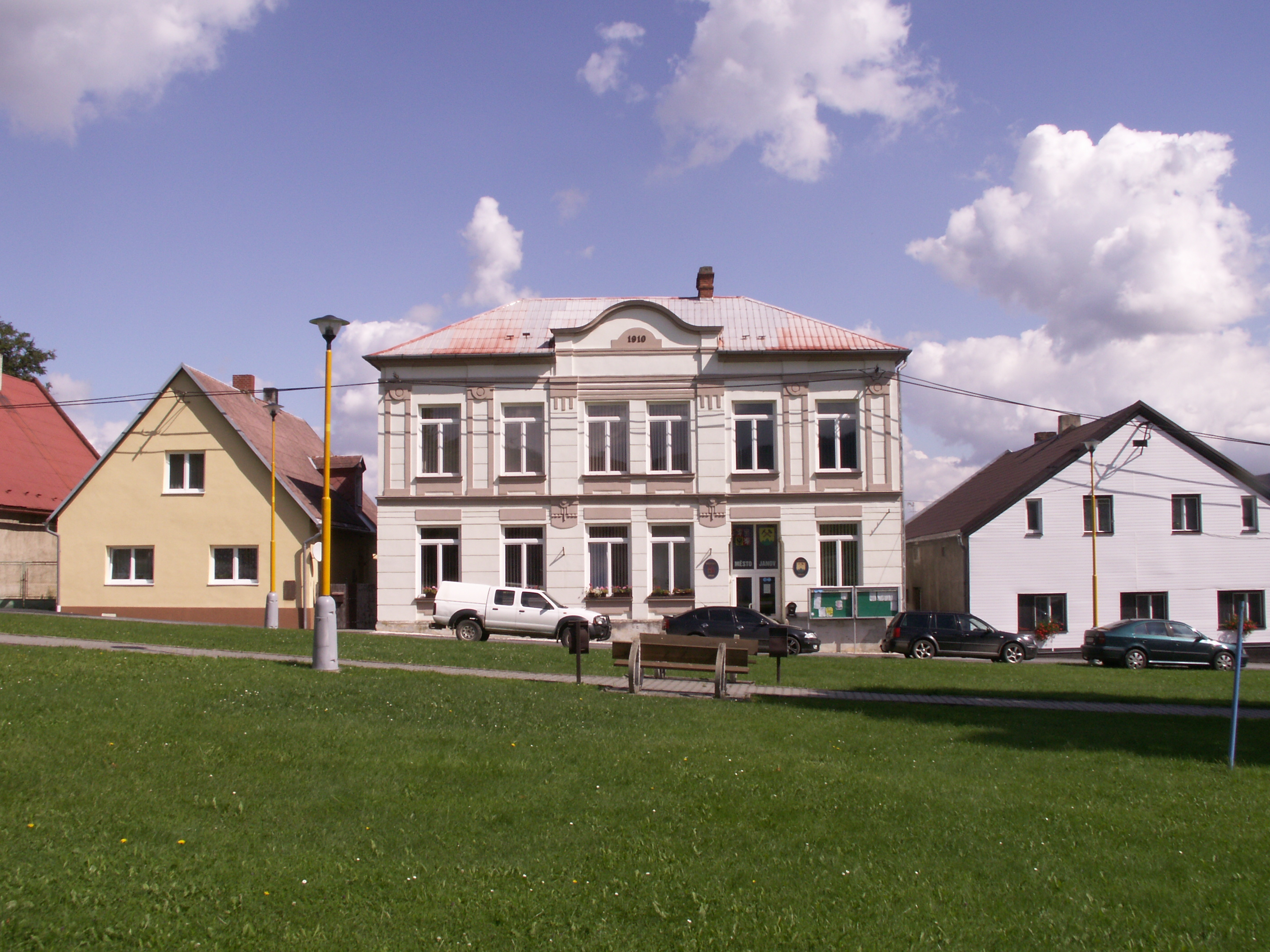 Městký úřad Janov, okres Bruntál